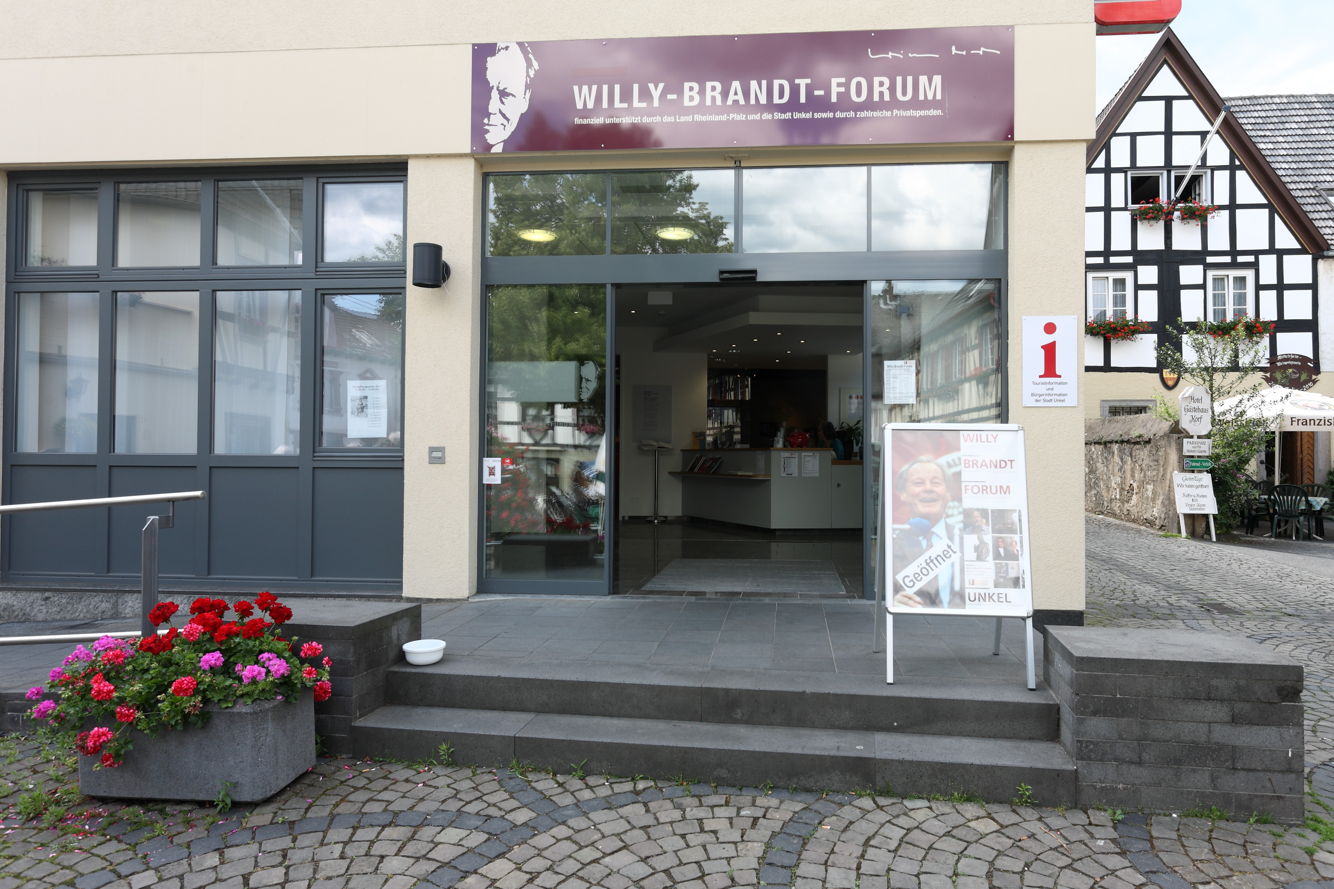 Außenansicht des Willy-Brandt-Forums in Unkel, Tourist- und Bürgerinformation der Stadt Unkel